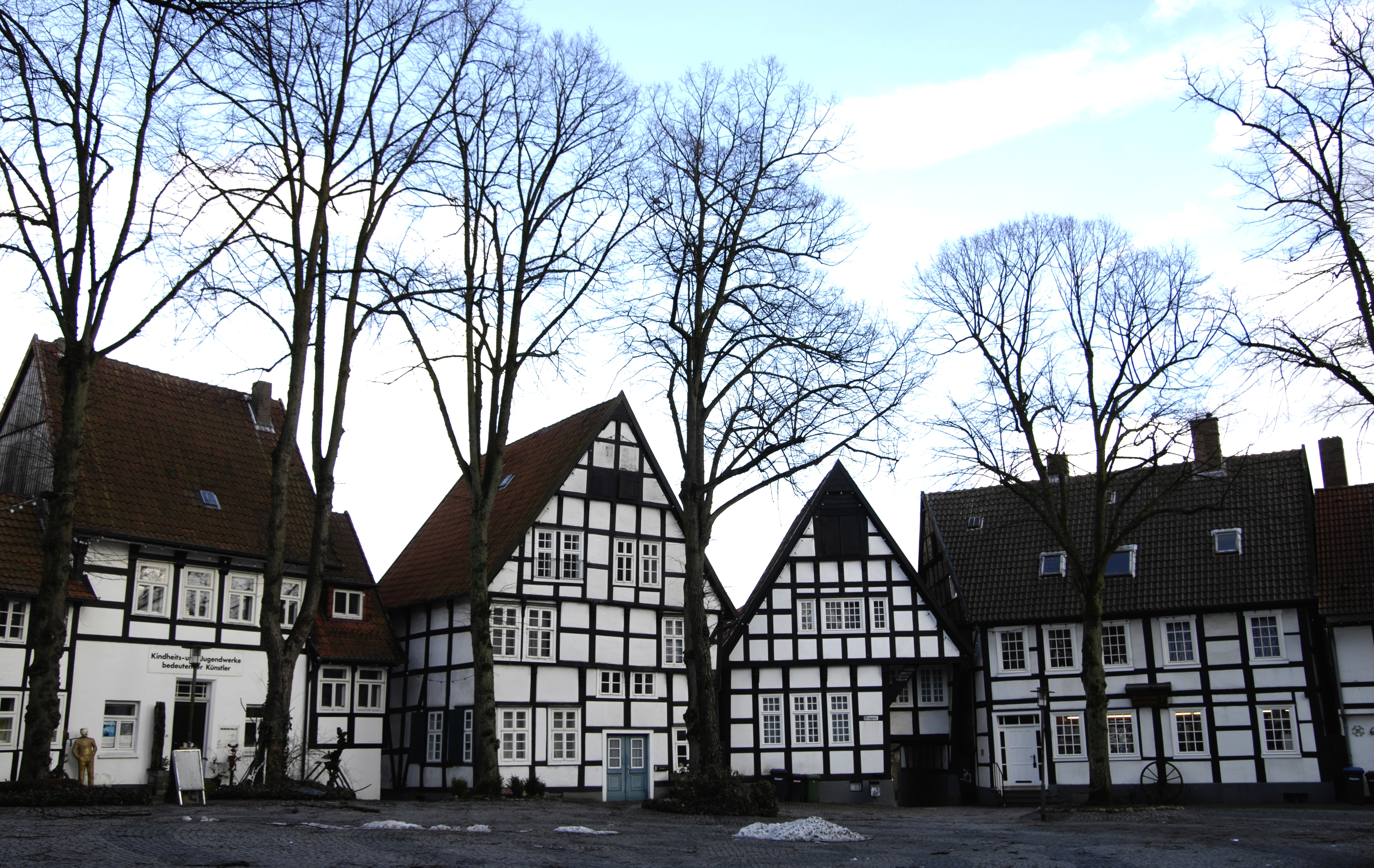 Halle/Westf., Kirchplatz, Fachwerhäuser